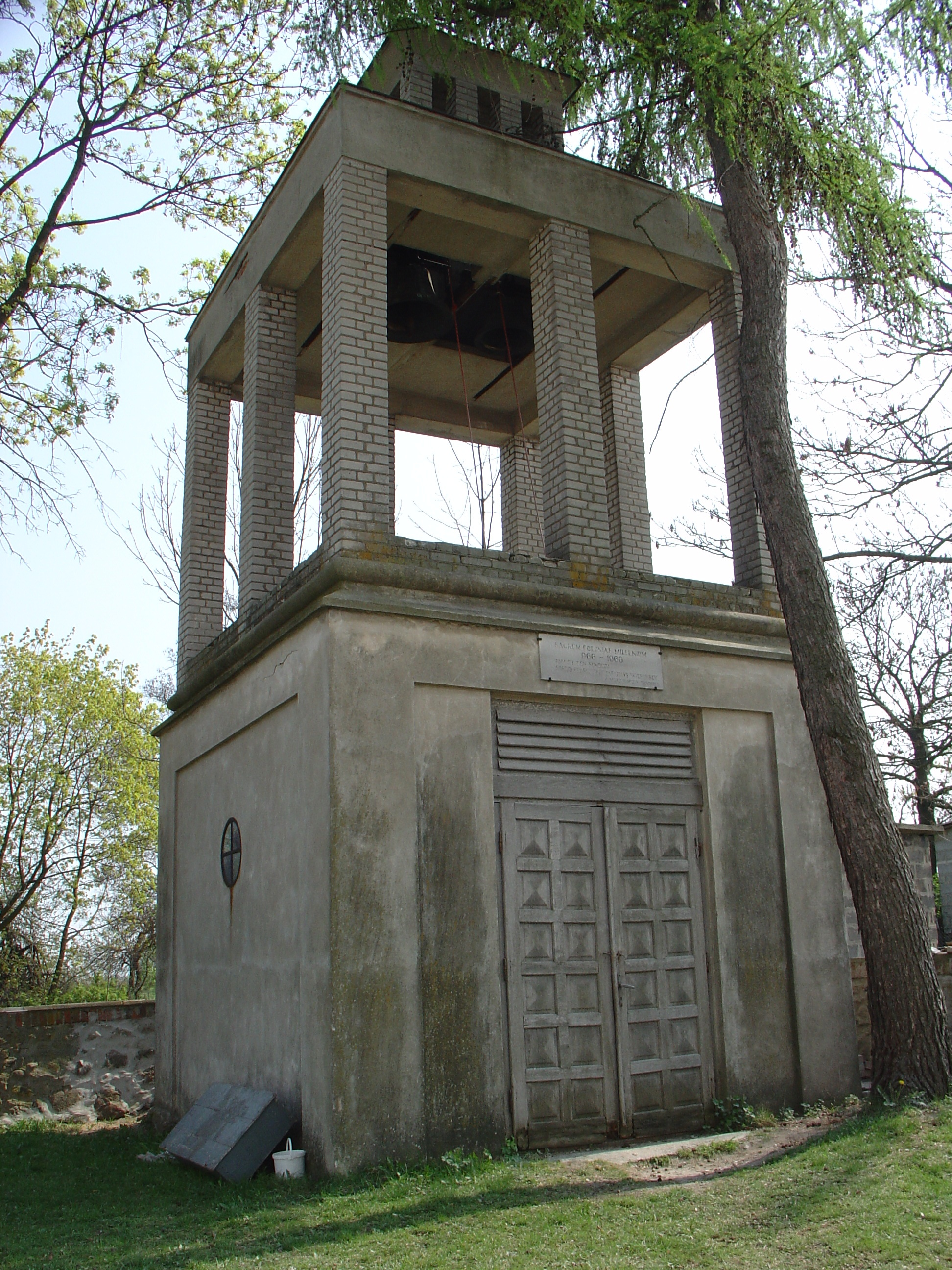 Dzwonnica w Knychówku